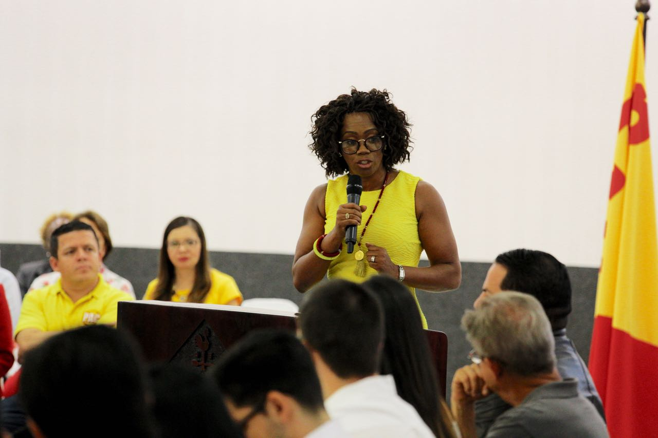 Epsy Campbell durante su presentación como candidata a la vicepresidencia de la República para las elecciones del 2018.